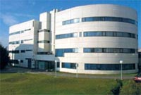 Edificio del IGAPE (Instituto Gallego de Promoción Económica)